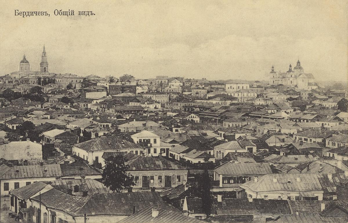 Бердичев в начале XX в., в ценре чуть справа - Староместная синагога напротив монастыря.